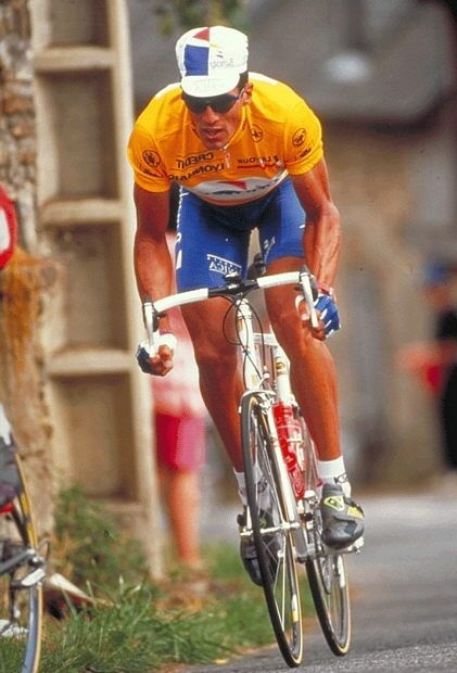 Miguel Indurain riding in the yellow jersey